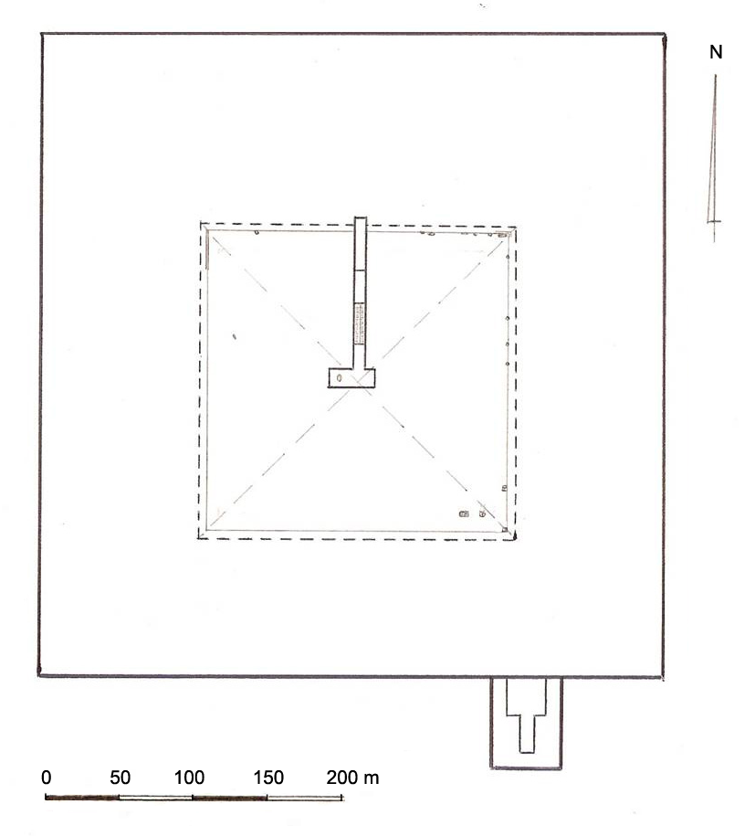 Complexe funéraire de la grande excavation de zaouiet el-aryan Komplex der unvollendeten Baka-Pyramide in Saujet el-Arjan